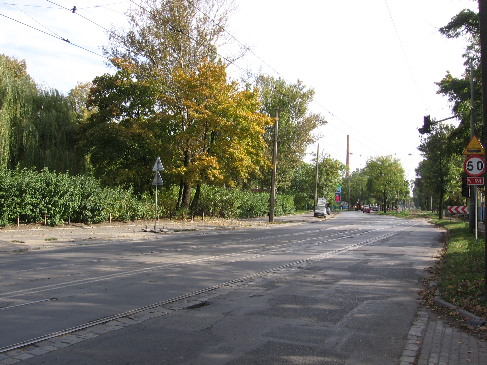 ul. Krakowska we Wrocławiu przy skrzyżowaniu z ul. Skibińskiego (miejsce, w którym torowisko tramwajowe ze środka jezdni przechodzi na pas zieleni obok jezdni), widok w kierunku południowo-wschodnim